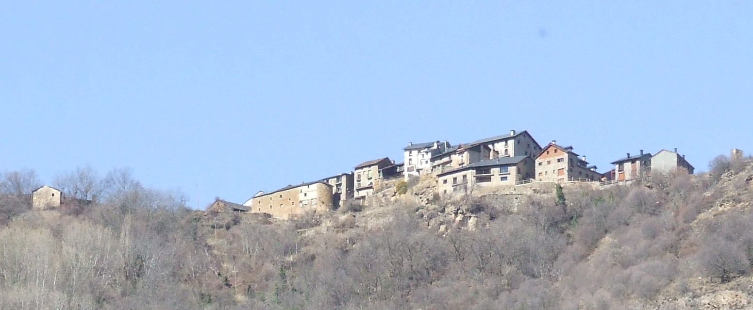 Pujalt (Enviny, Sort, Pallars Sobirà)